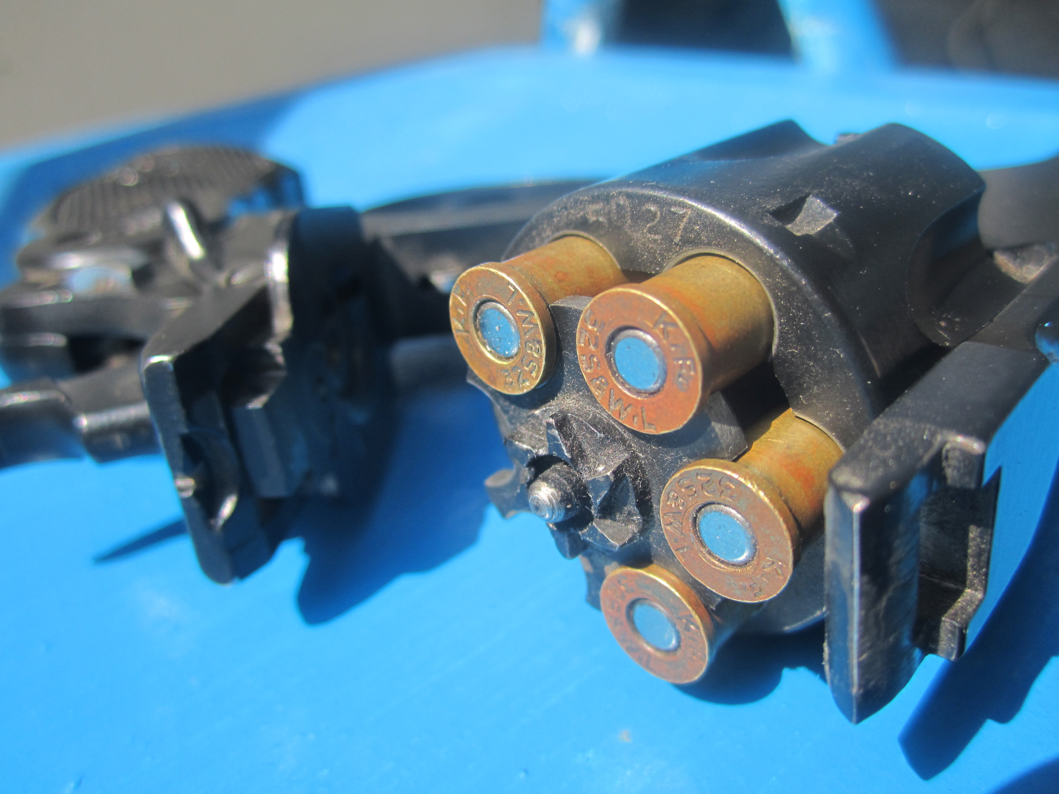 Pistol opened